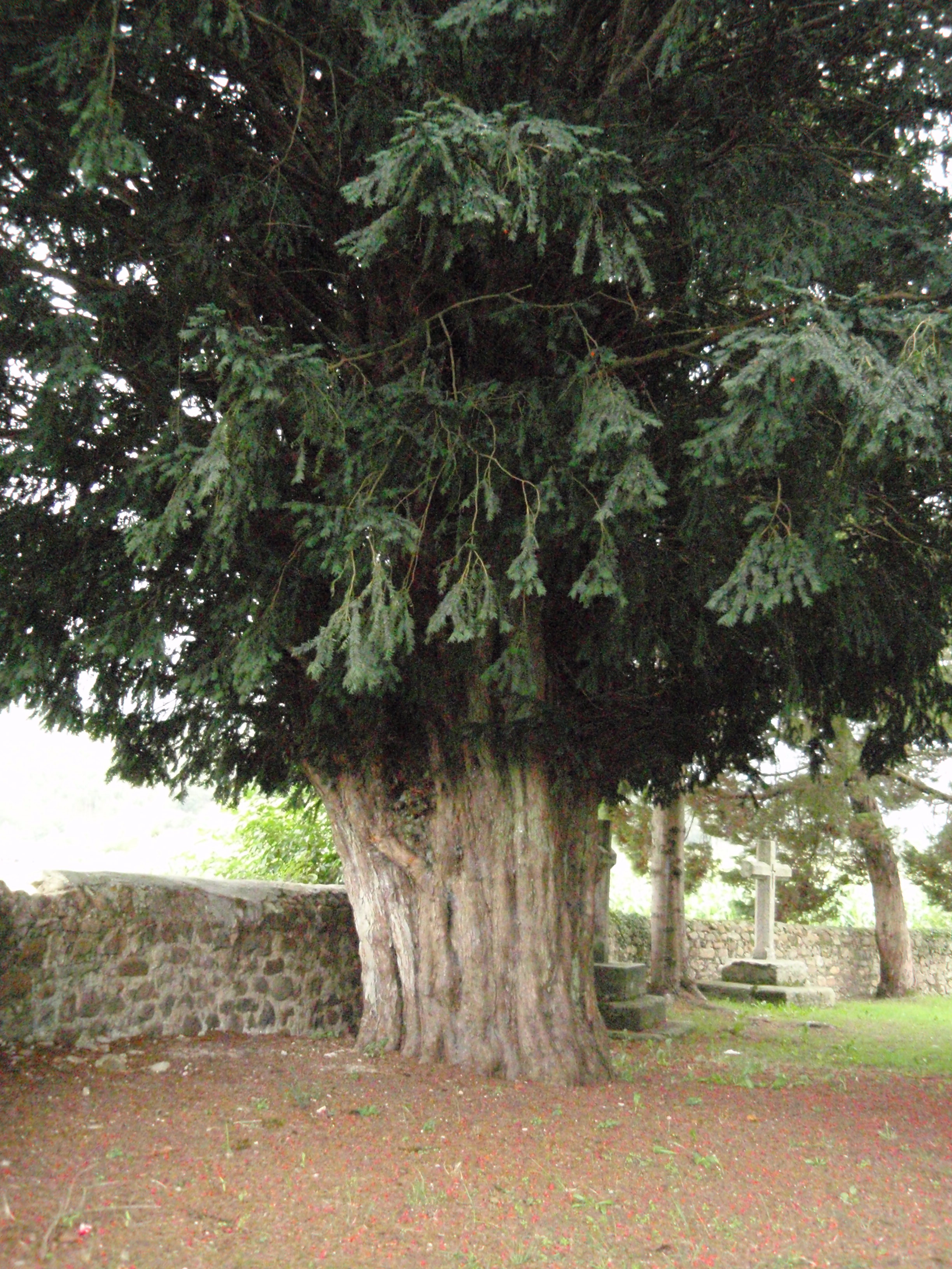 Tejo de Casar de Periedo, Cantabria. Situado junto a la Iglesia de Casar, se trata del arbol singular de cantabria, inventariado como Nº22